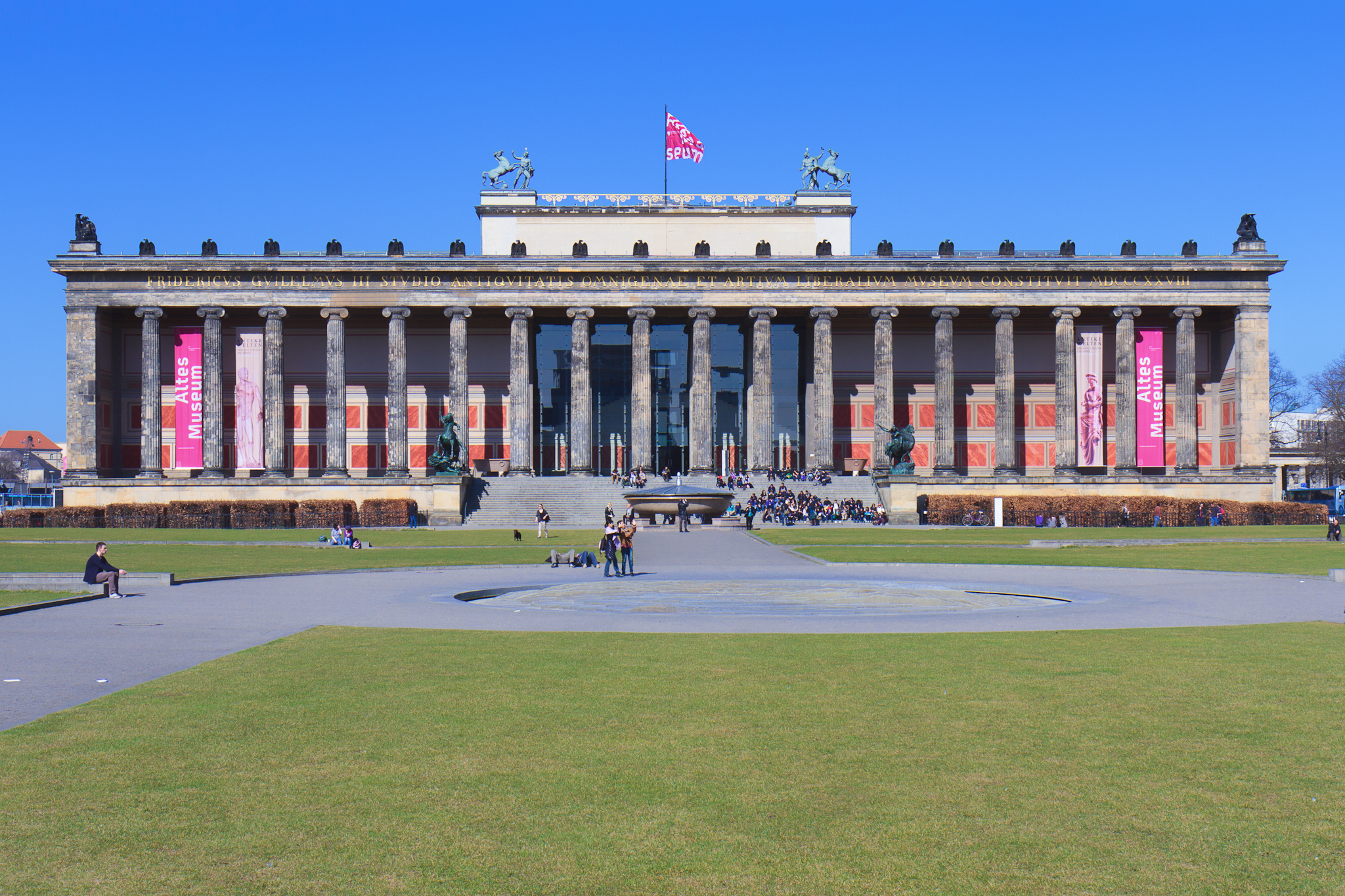 Altes Museum in Berlin vom Lustgarten aus gesehen.This is a photograph of an architectural monument.